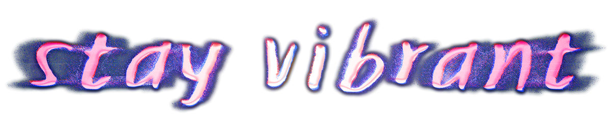 San Holo's "stay vibrant" logo.